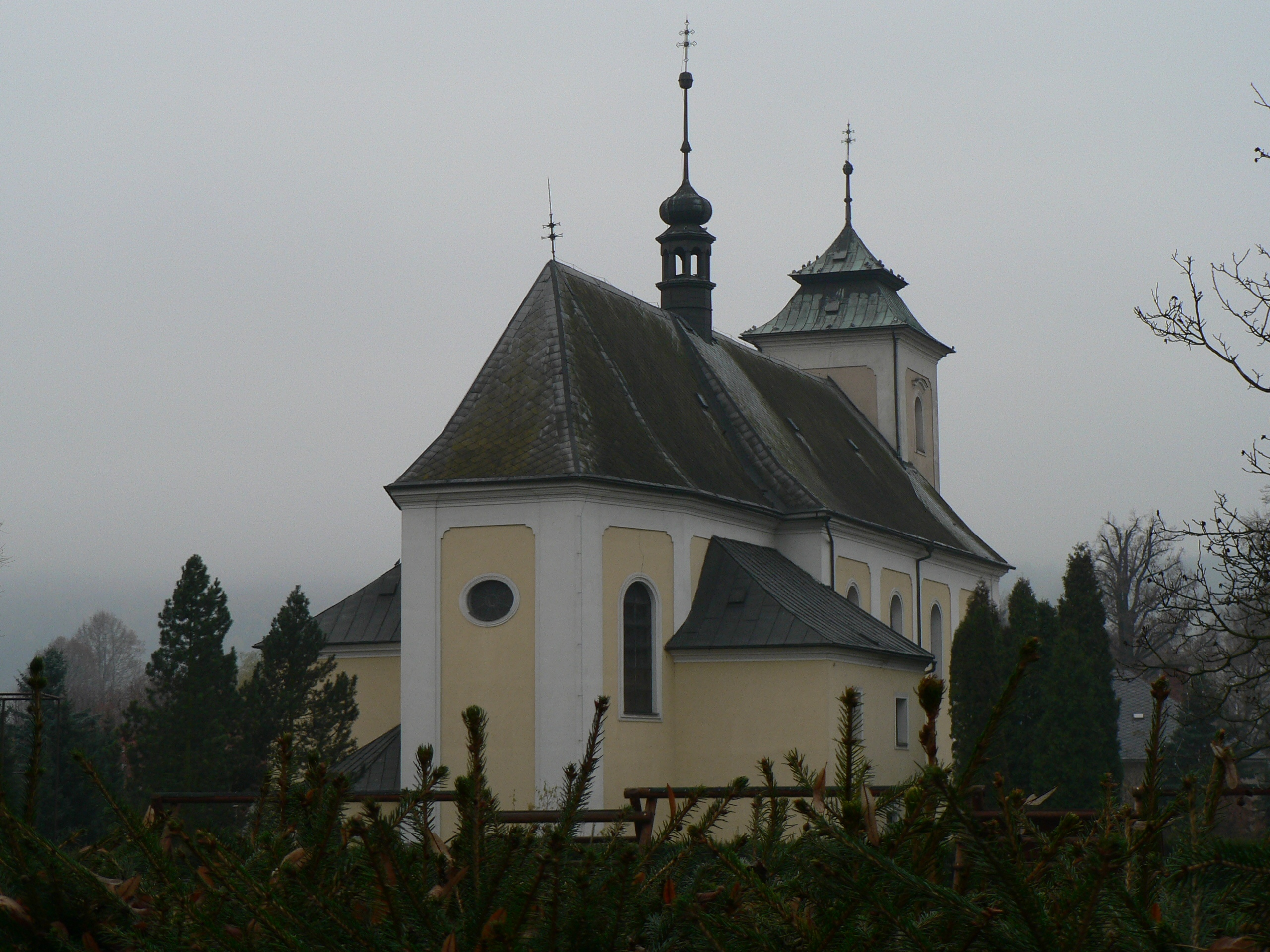 Kostel svatého Jiří (Libina)